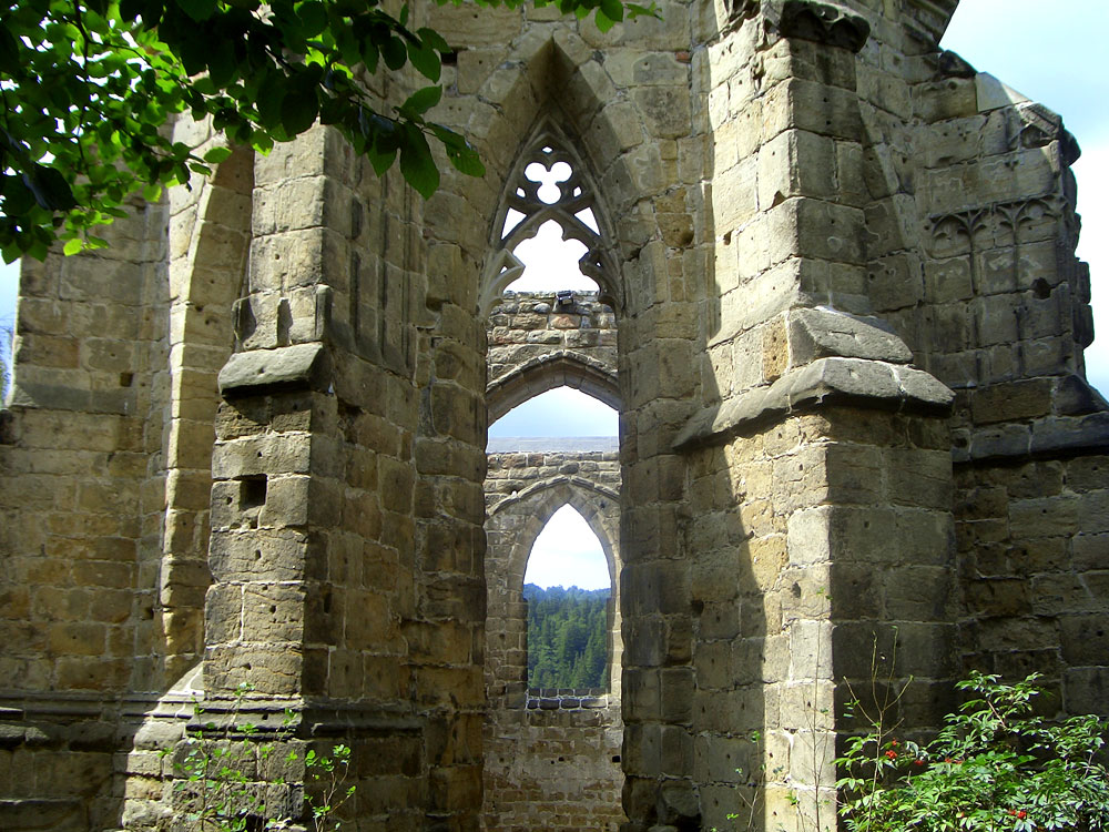 Klosterruine Oybin